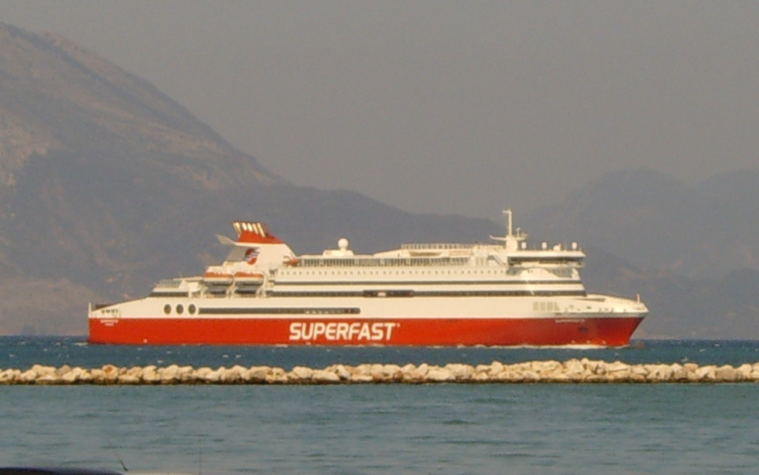 Un Ferry Superfast approche du port de Patras (Grèce)